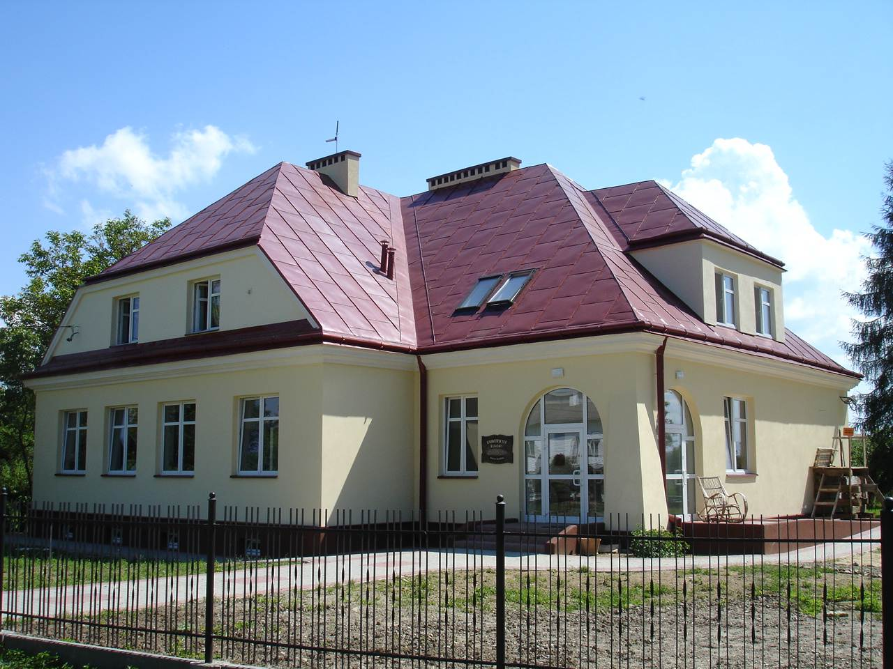 Wola Sękowa private school